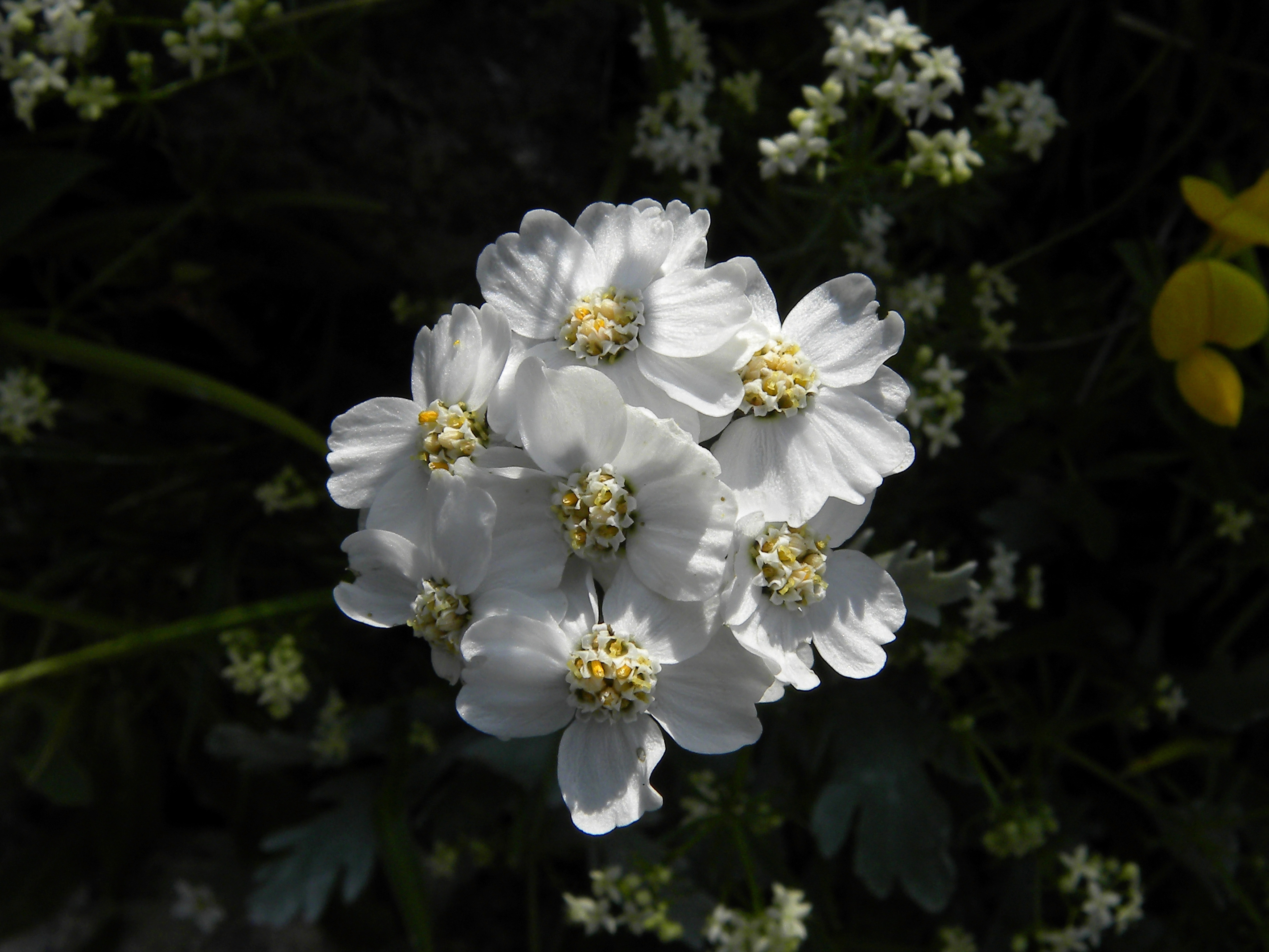 Eine Steinraute (Achillea clavennae) auf der Rax